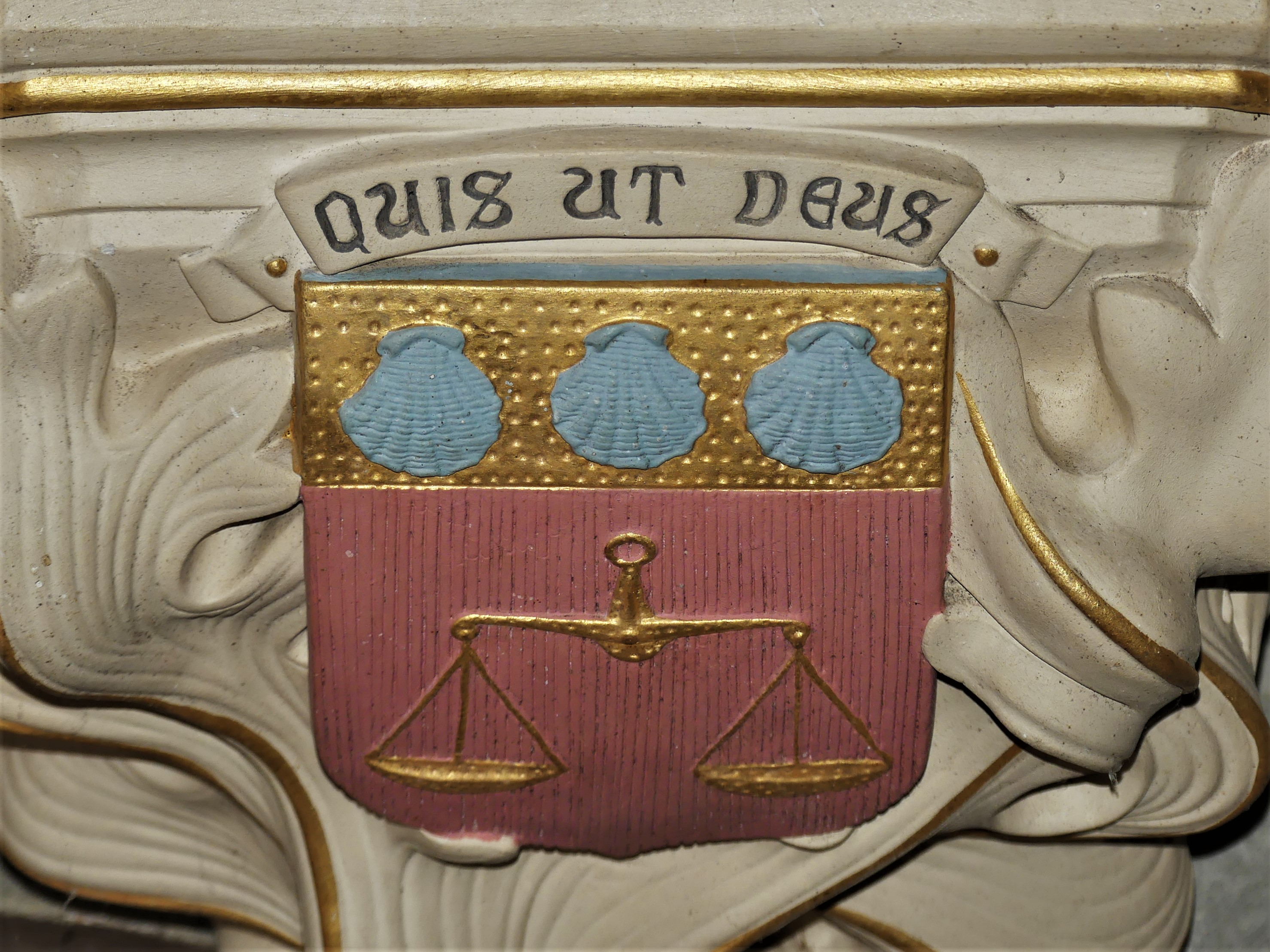 Détail du support d'une statue représentant l'archange saint Michel, église de La Serre-Bussière-Vieille, Creuse, France.